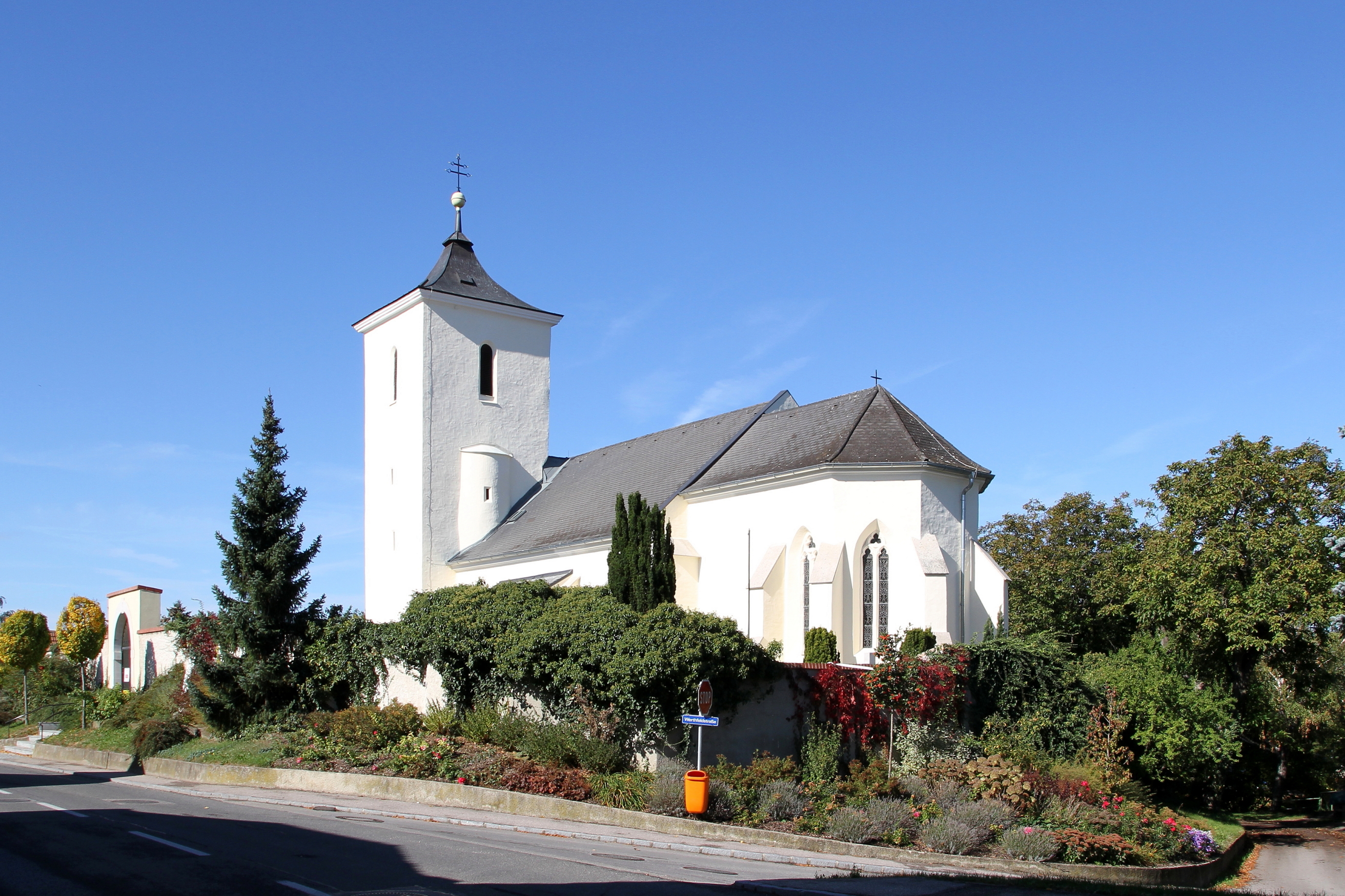 Die kath. Filialkirche hl. Ulrich in Baumgarten am Tullnerfeld, ein Ortsteil der niederösterreichischen Marktgemeinde Judenau-Baumgarten.